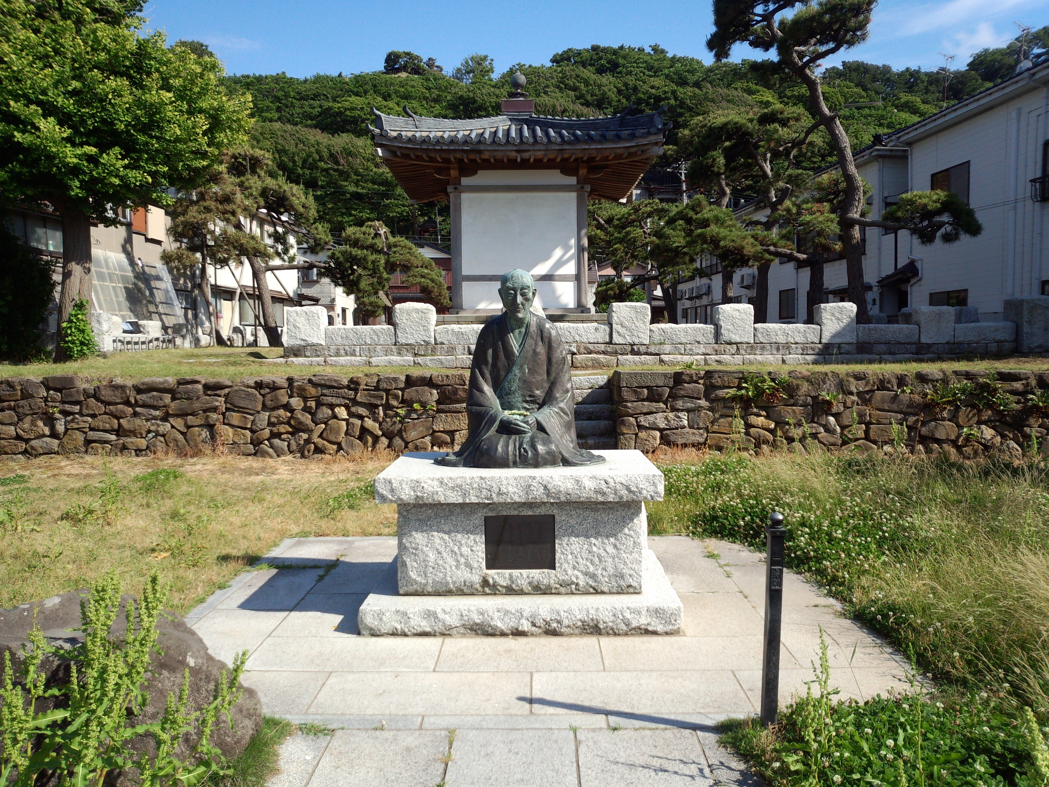 良寛の出生地